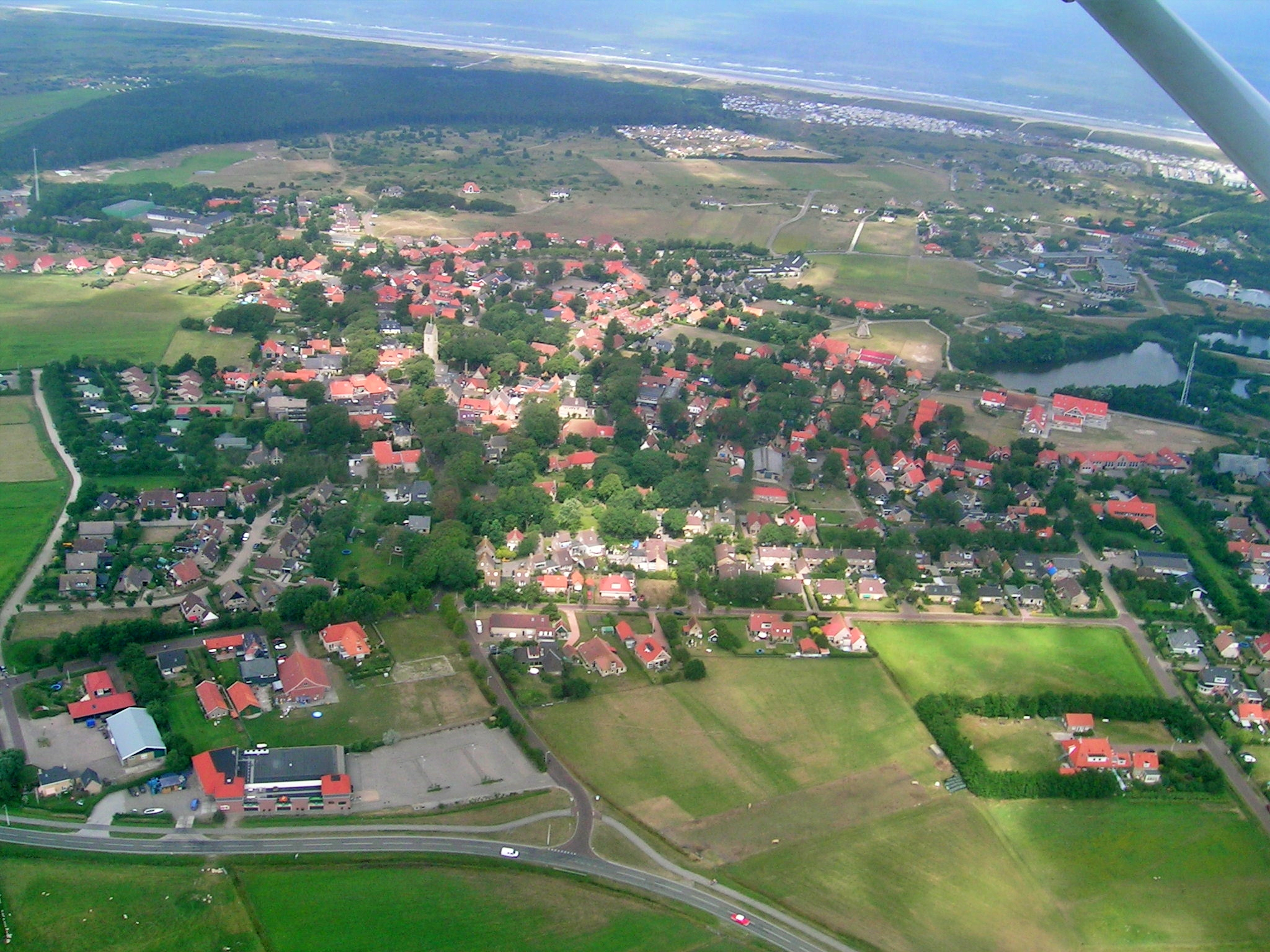 Luftaufnahme von Nes auf Ameland, aus dem Flugzeug